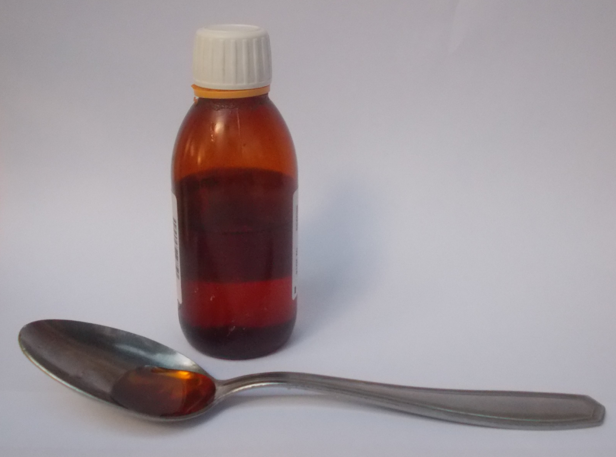 Sirop contre la toux et cuillère à soupe - Cough syrup with tablespoon.